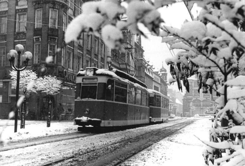 ADN-ZB-Ludwig-13.4.1984-Erfurt: Anhaltende Schneefälle- In der Bezirksstadt wurde in den Morgenstunden mit stellenweise 24 Zentimetern die höchste Schneedecke des Winters 1983-84 gemessen. Verschneit zeigt sich auch der Anger (Foto).